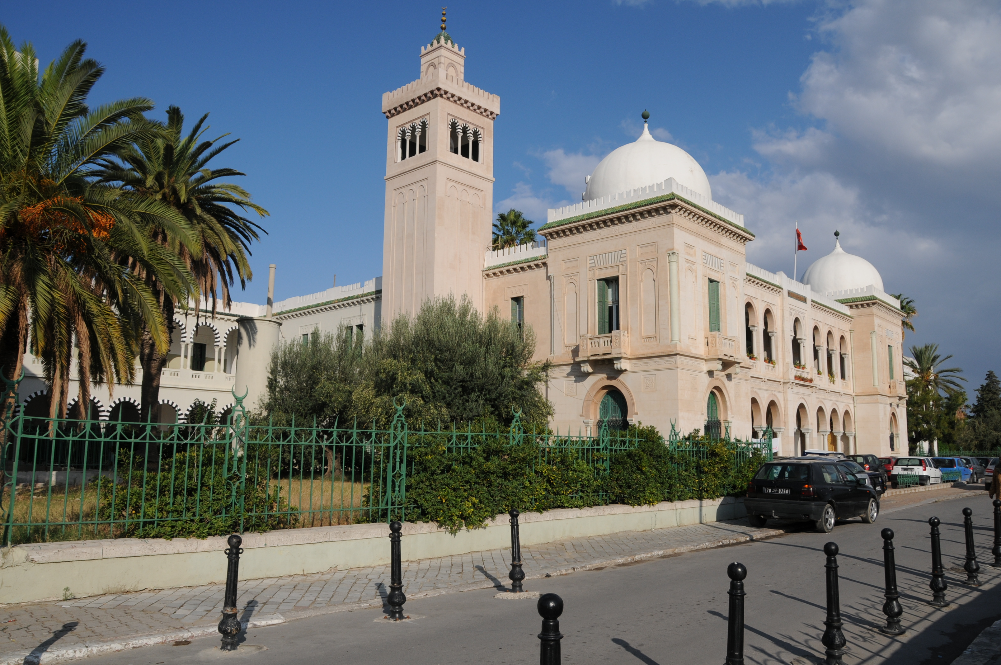 Aile sud du Collège Sadiki à Tunis (Tunisie)